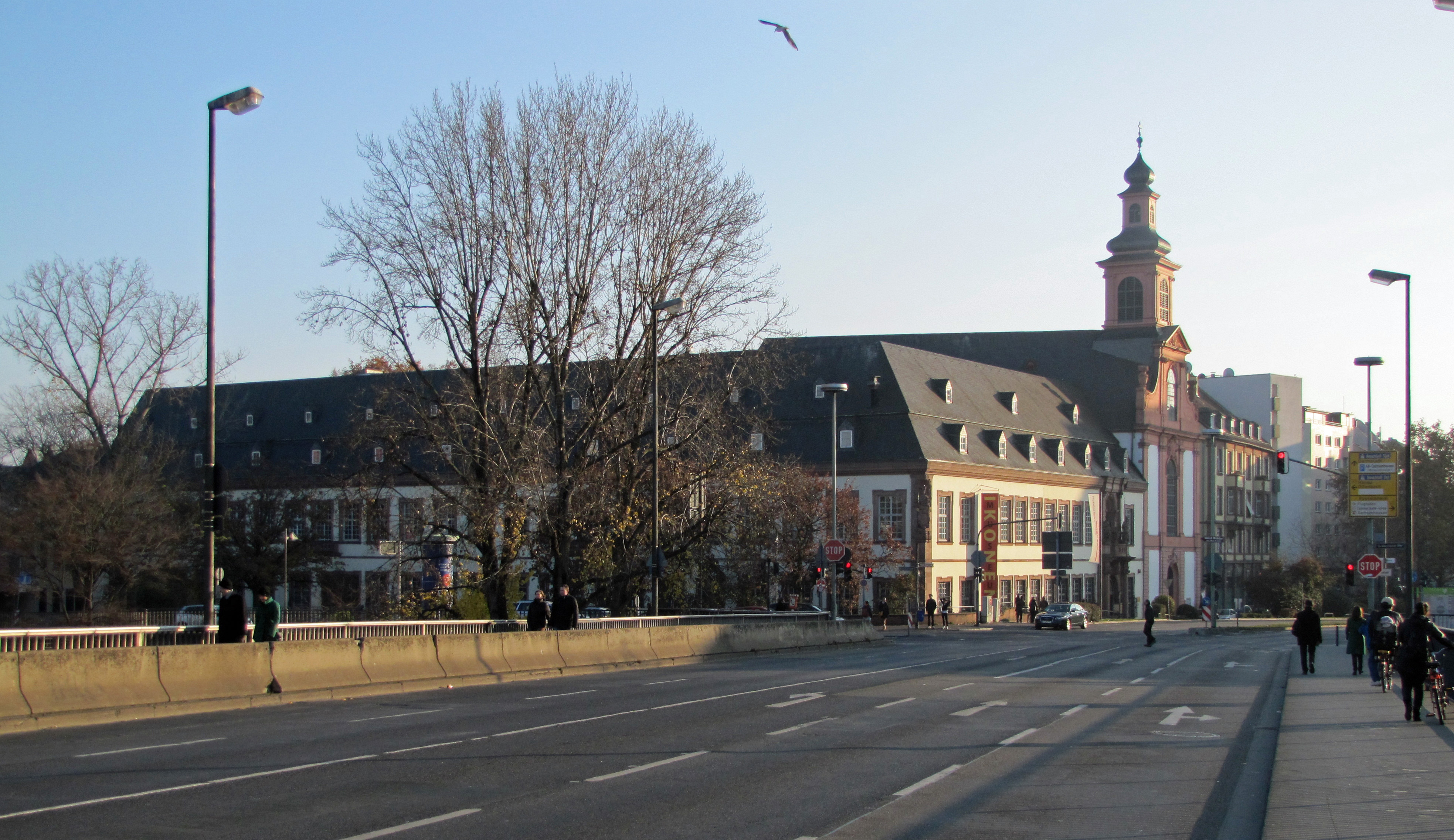 Deutschordenshaus und -kirche in Frankfurt am Main. Ansicht von der Alten Brücke.